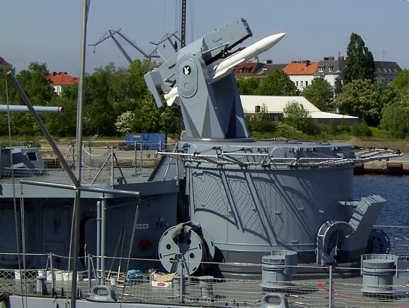 Flugkörperstarter MK 13 Mod. 1 mit Attrappe eines Tartar Flugabwehr-Flugkörpers. Auf genommen beim Zerstörer "Mölders" im Marinemuseum Wilhelmshaven. Am linken Bildrand unterhalb des Geschützrohres das Fenster der Kontrollkabine